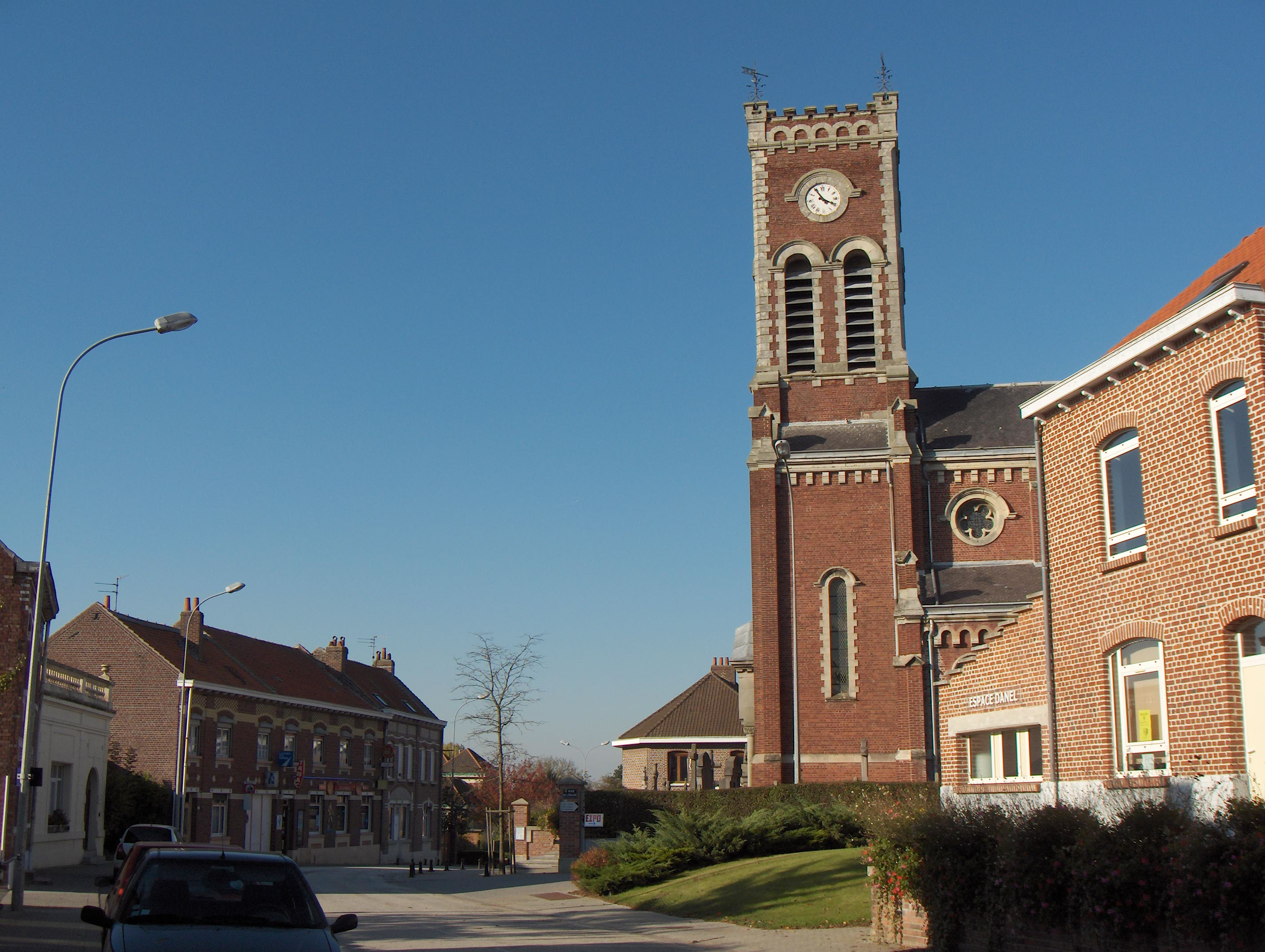 Radinghem-en-Weppes (France, dept. Nord), église Saint-Vaast